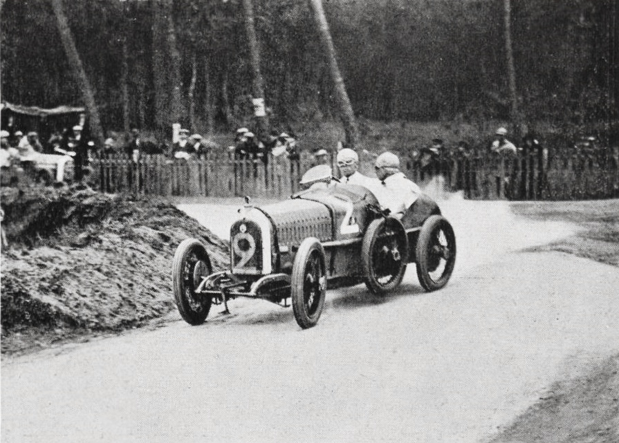 Kenelm Lee Guinness gagnant de la Coupe des Voiturettes 1922 au Mans, sur Talbot-Darracq 56 - Le Sport Universel Illustré du 22 septembre 1922, p.362